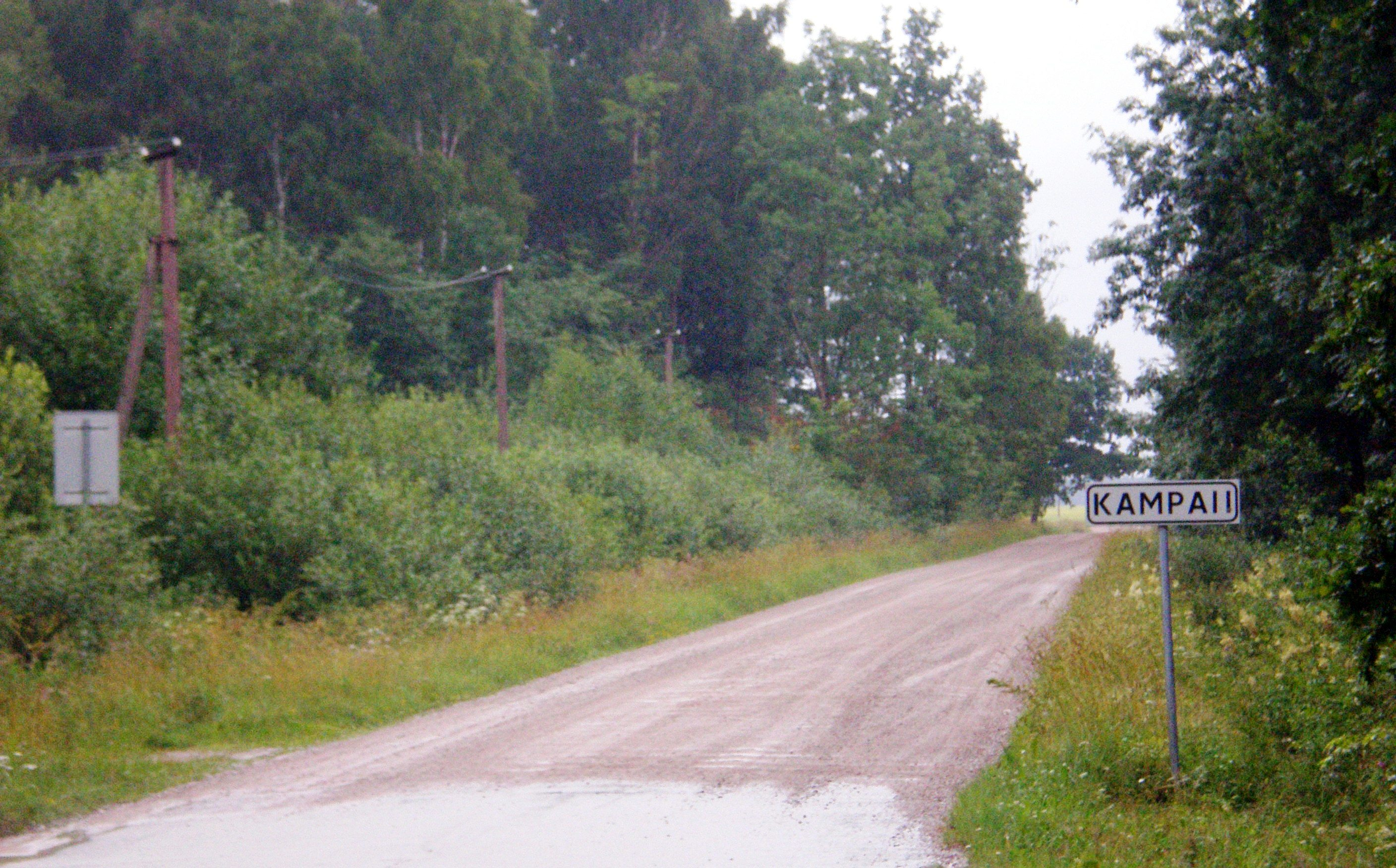 Kampai II, Kėdainių raj.